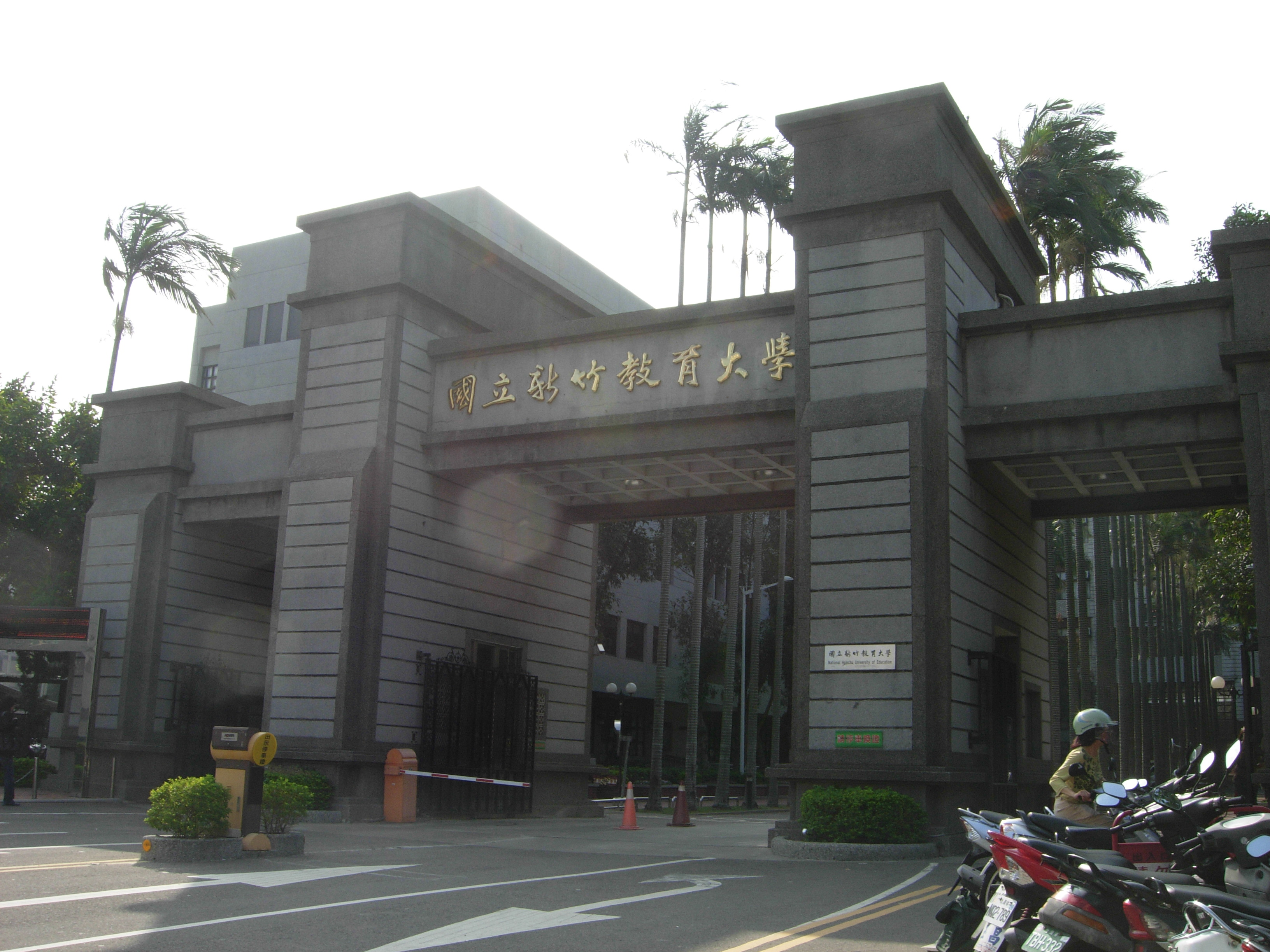 国立新竹教育大学校门口